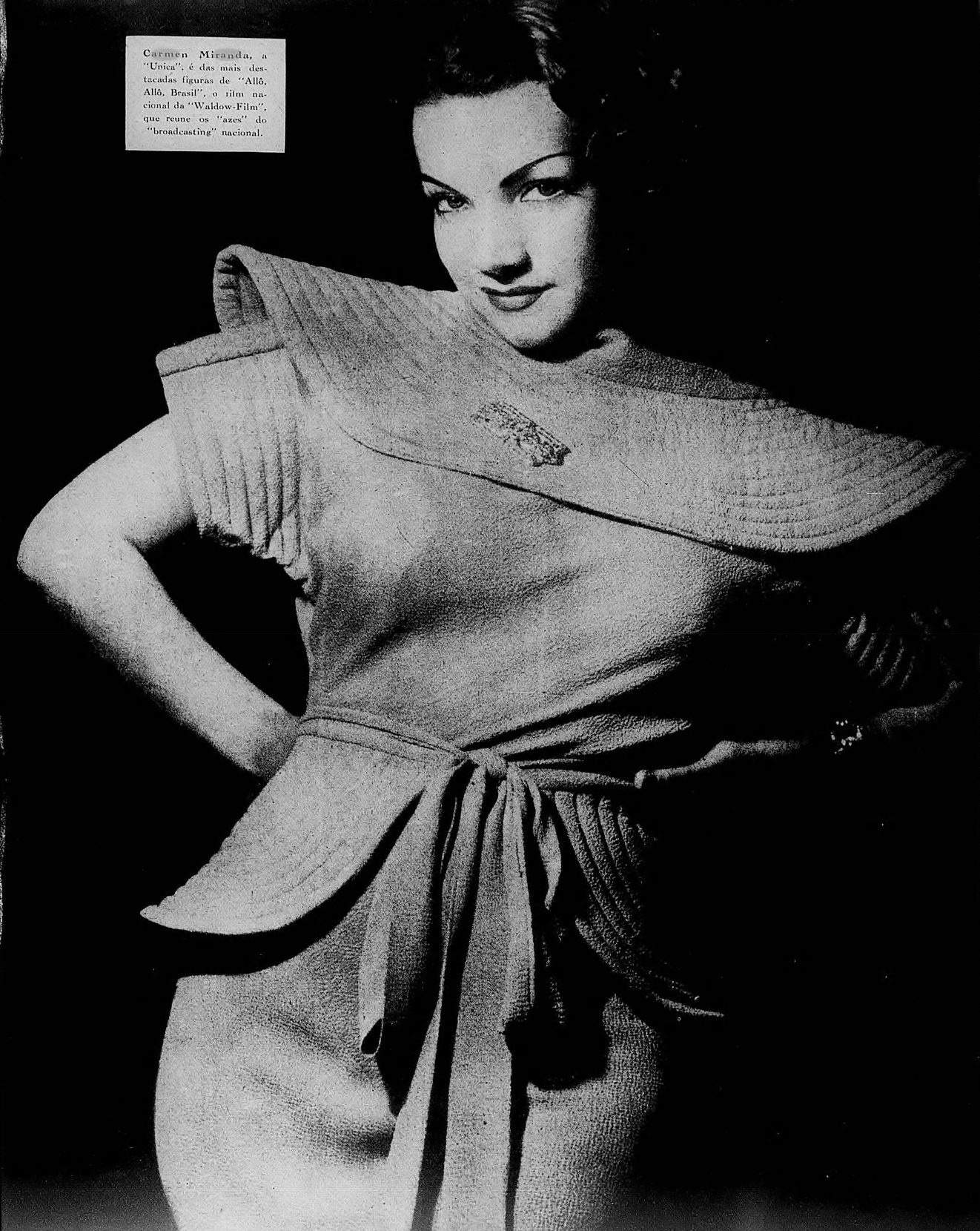 Carmen Miranda em A Scena Muda, 2 de Fevereiro de 1935